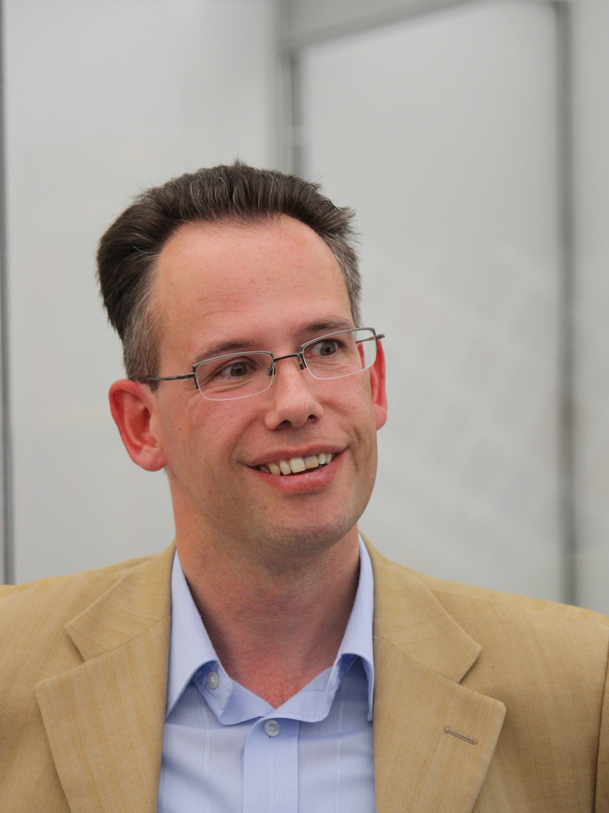 Jiří Šulc na 17. mezinárodním knižním veletrhu Svět knihy v Praze Personality rights warning Although this work is freely licensed or in the public domain, the person(s) shown may have rights that legally restrict certain re-uses unless those depicted consent to such uses. In these cases, a model release or other evidence of consent could protect you from infringement claims.